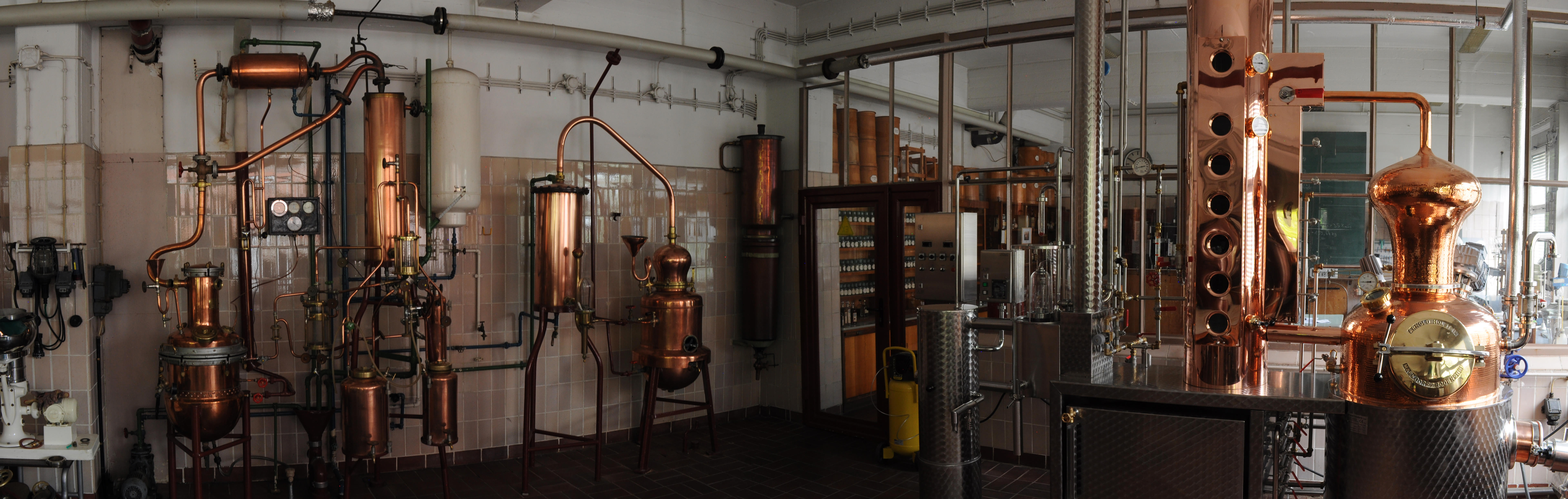 Panorama durch 3 Jahrhunderte. V.l.n.r.: Vakuumdestillationsanlage von 1952, Kräuterdestillationsanlage von 1874, Brennanlage von 2019. Ort: Preussische Spirituosen Manufaktur.